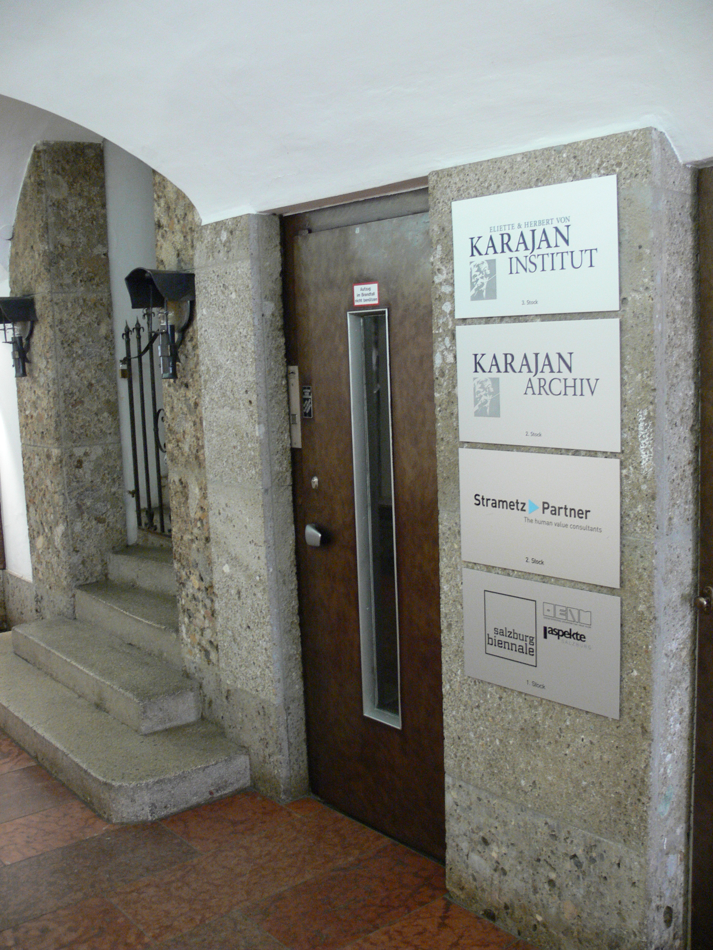 Karajan-Institut und Karajan-Archiv, Getreidegasse, Salzburg